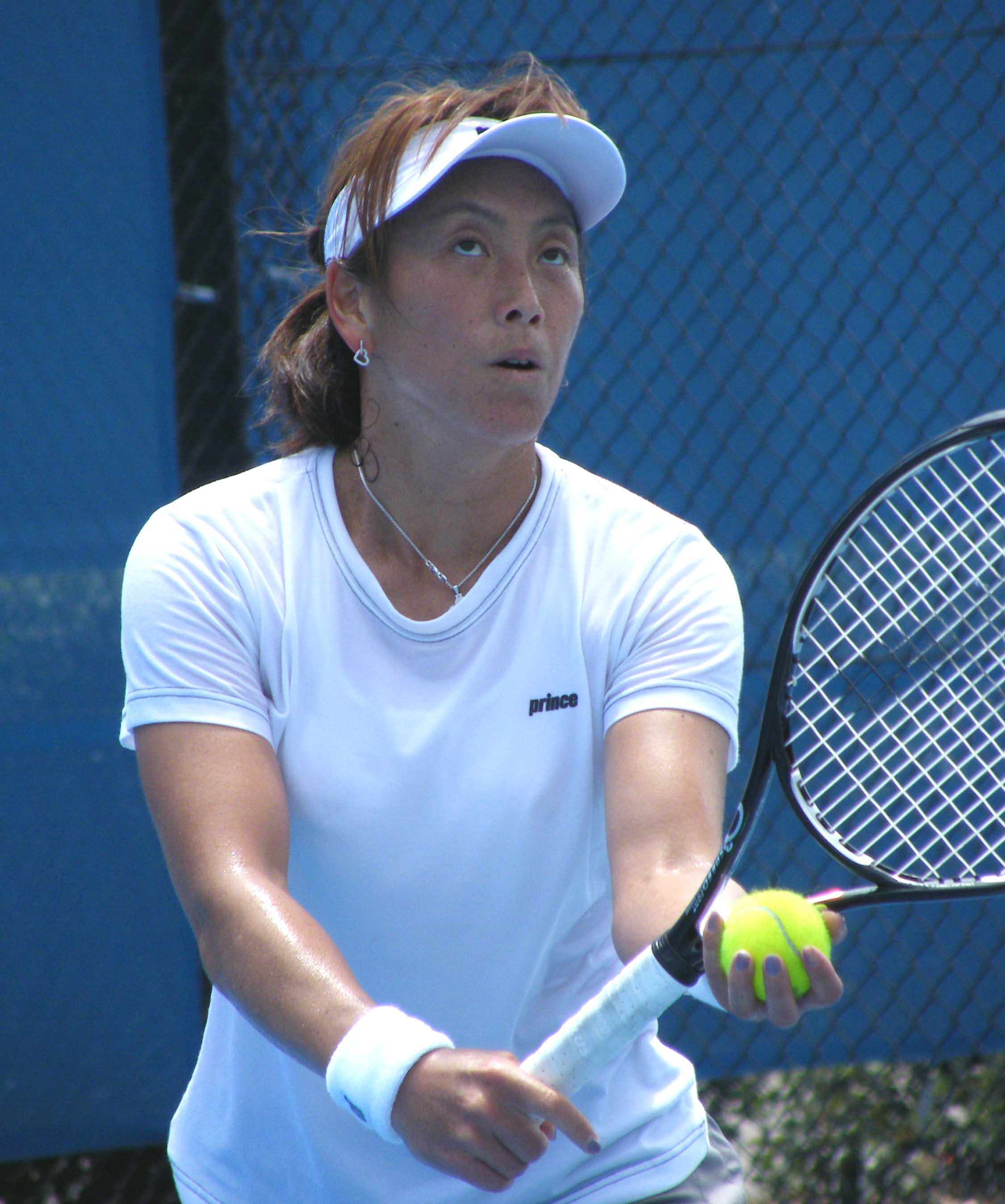 Ai sugiyama of japan - nsw open january 2009